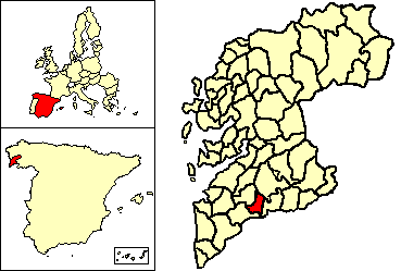 Municipio de Salceda de Caselas respecto a la provincia de Pontevedra (España)